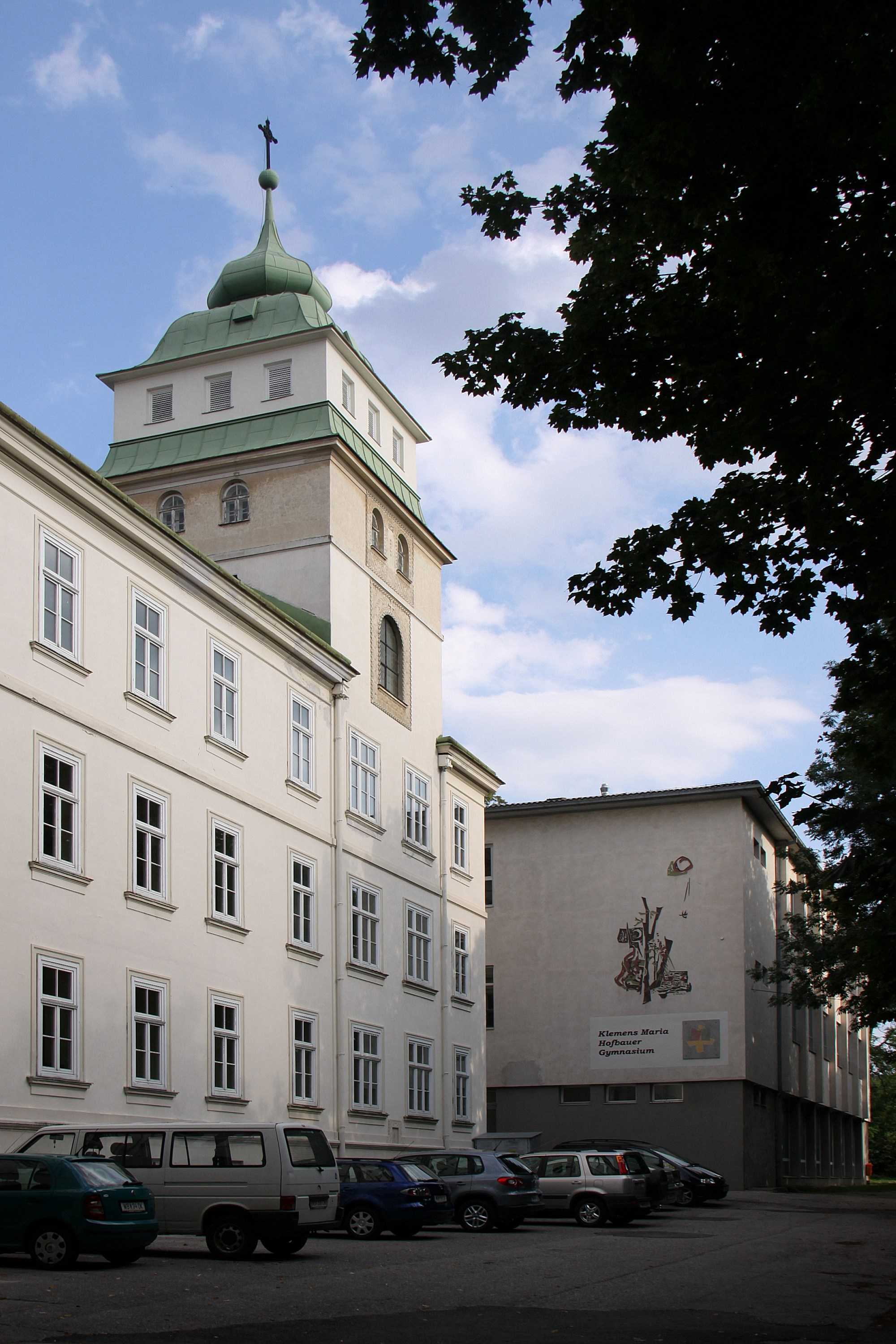 Denkmalgeschütztes Redemptoristenkloster und Schule in Katzelsdorf. Object location47° 46′ 06.96″ N, 16° 16′ 23.92″ E